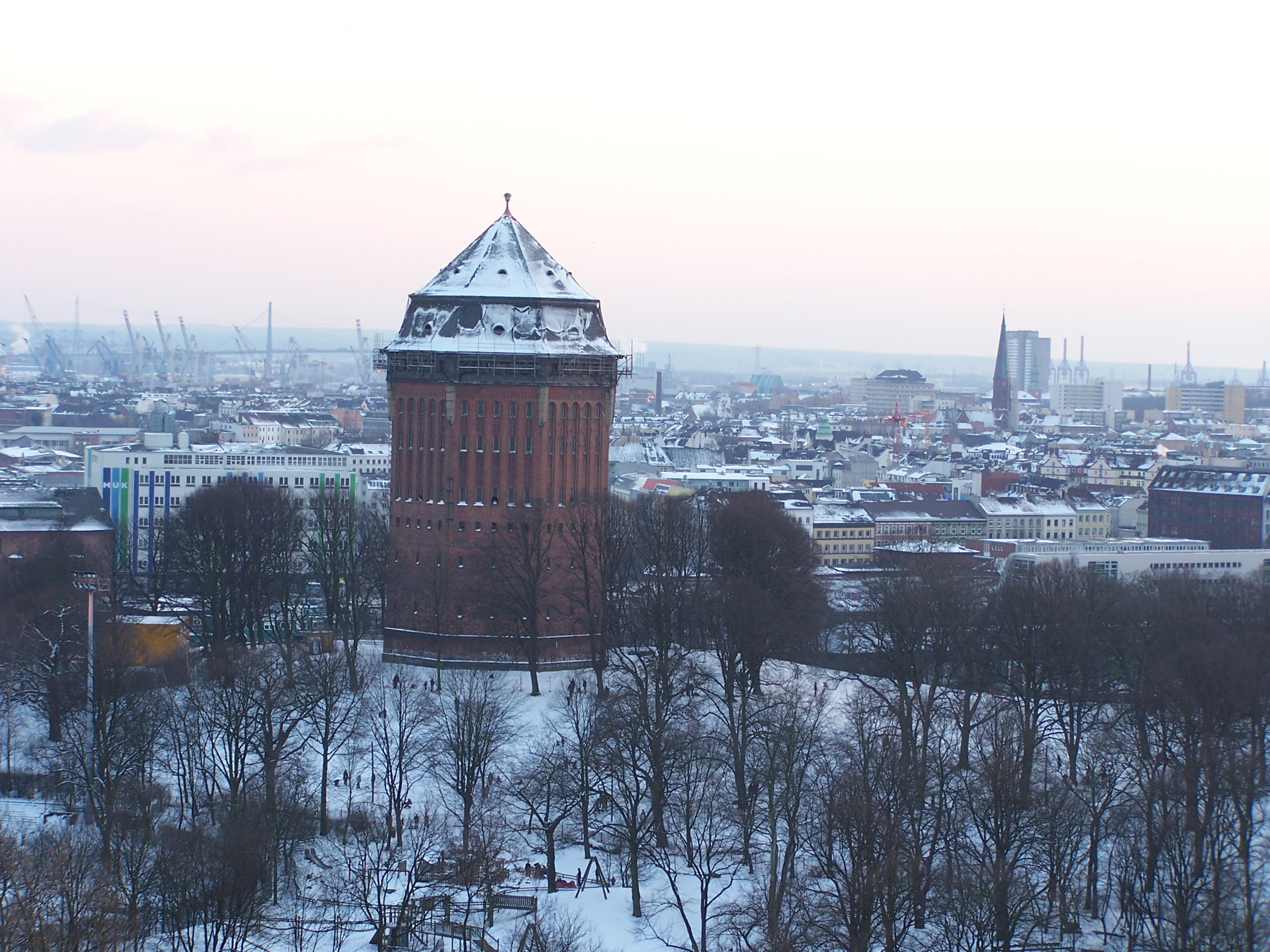 Wasserturm im Schanzenpark, Hamburg Sternschanze, vor dem Umbau zum Hotel This is a photograph of an architectural monument.